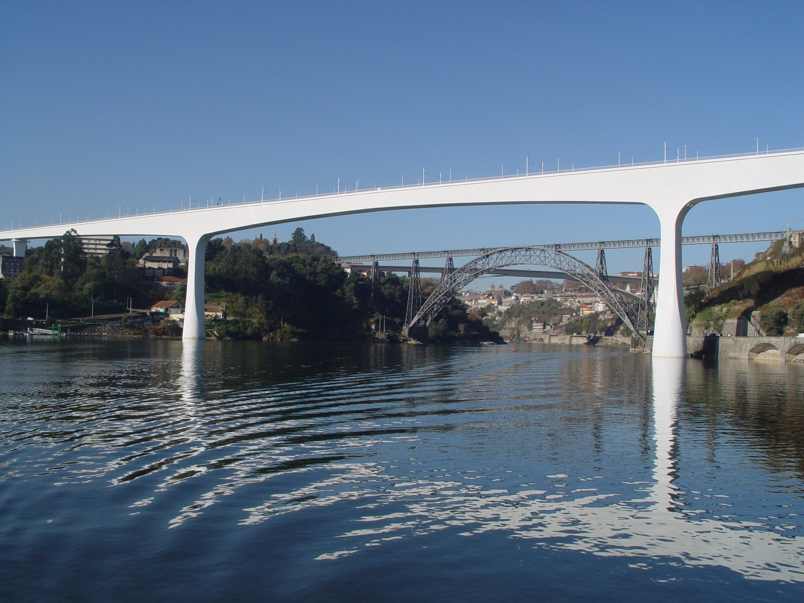 Sao Joao Bridge in Porto Portugal